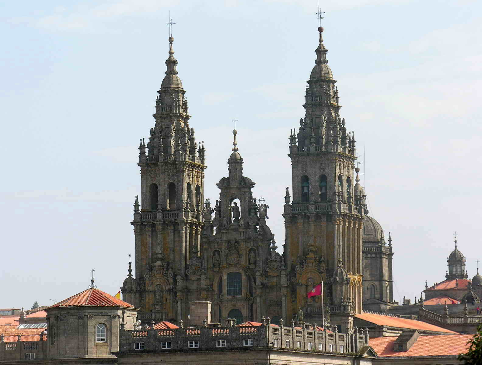 Santiago de Compostela - Galicia - España (Spain)